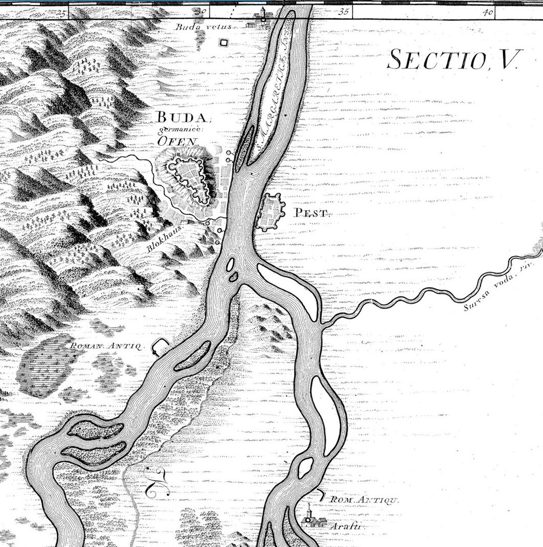 Luigi Ferdinando Marsigli (1658 — 1730) és Johann Christoph Müller (1673 — 1721), csillagászati helymeghatározásokat is felhasználva megújította a Kárpát-medence térképi arculatát. A „Mappa Generalis” című térképművük, a folyót a Bécs feletti Kahlenbergtől a bulgáriai Jantra folyóig mutatja be. Ezt a folyószakaszt 18 részre osztották, és az egyes szakaszokat külön szelvényen mutatták be.